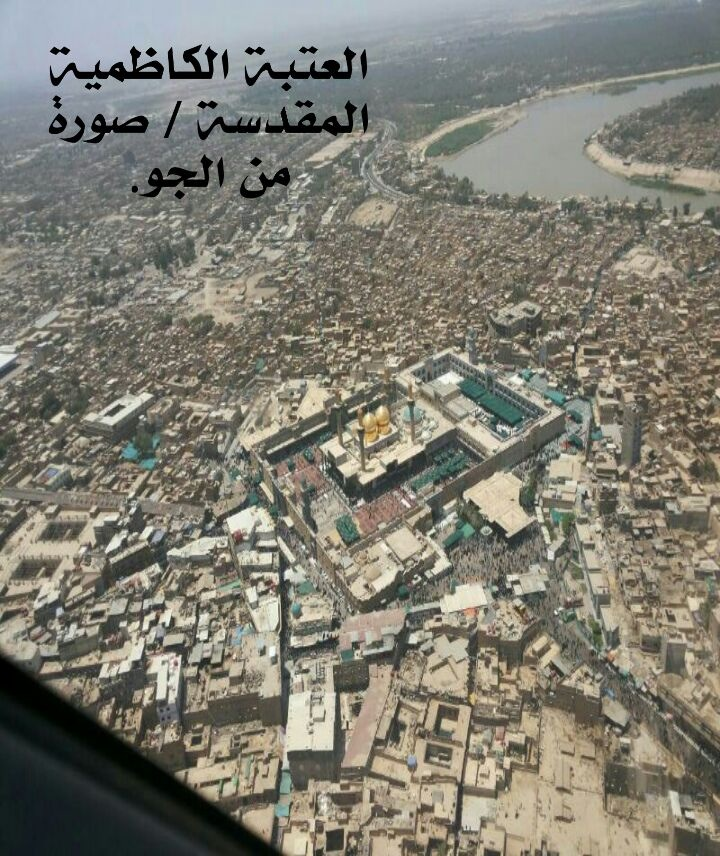 Ataba kadthimiyah